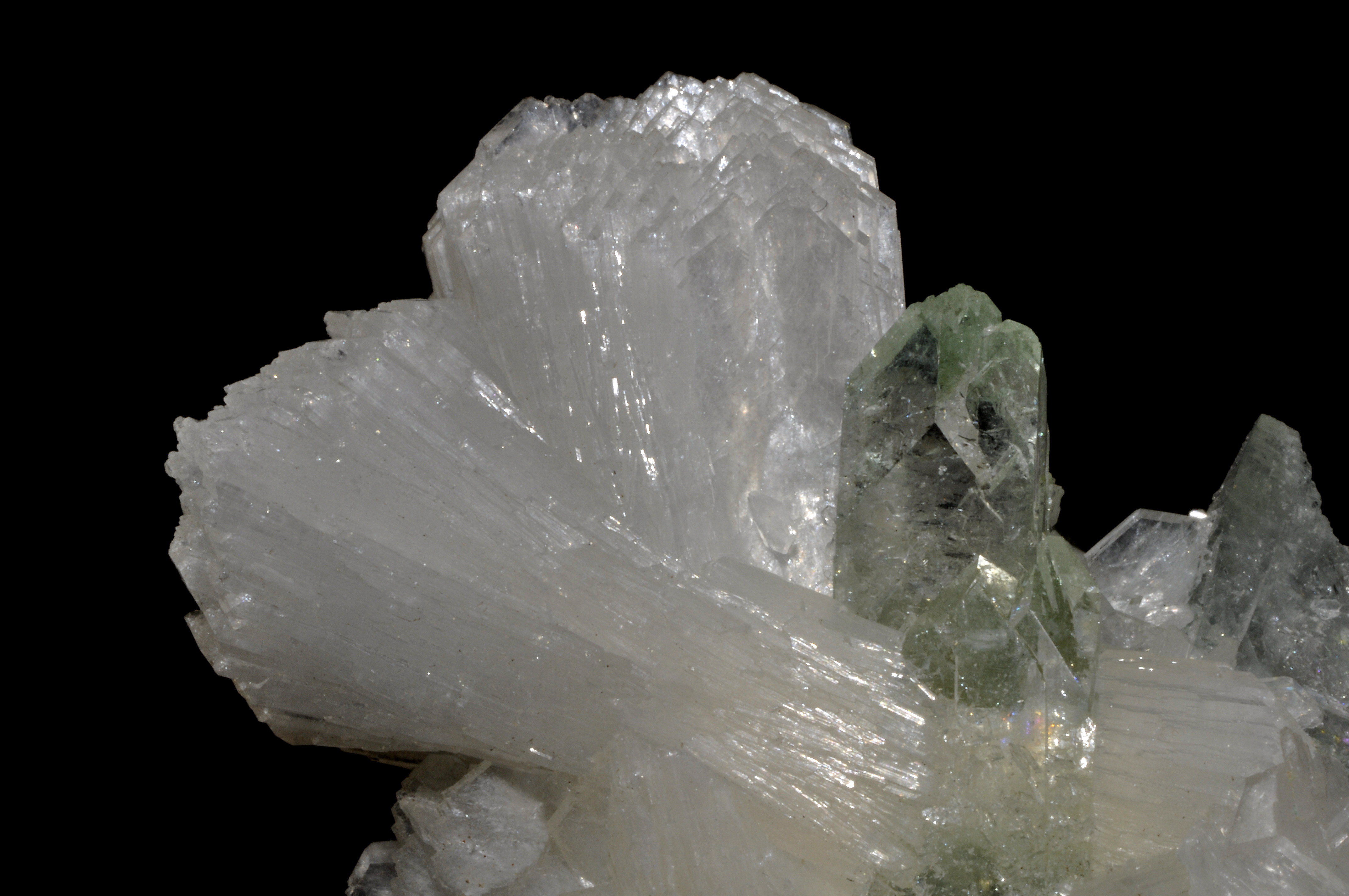 cristaux de stilbite et cristal d'apophyllite